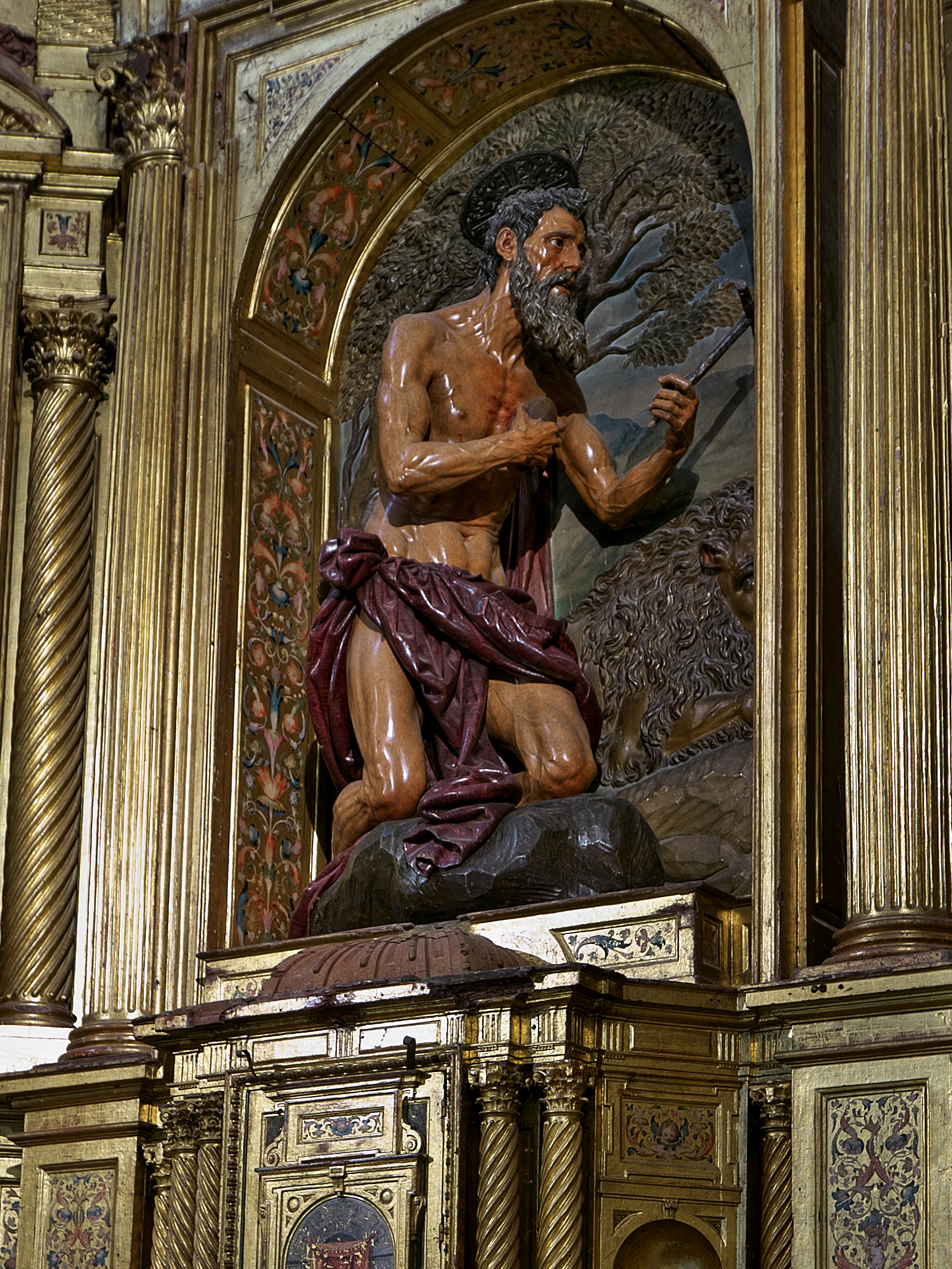 Monasterio de San Isidoro del Campo, Santiponce. Imagen central, Sevilla 1611, del retablo mayor; madera de cedro, policromada por Francisco Pacheco; de bulto redondo, procesional de 1,60 m. Con el también San Jerónimo de Pietro Torrigiano, Sevilla 1521, constituyen obras universales de la escultura. Esta talla titulará al maestro Martínez Montañés como El Dios de la madera.